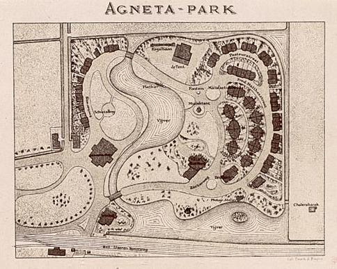 kaart Agnetapark (1885) uit collectie Van Marken bron: wegens ouderdom PD